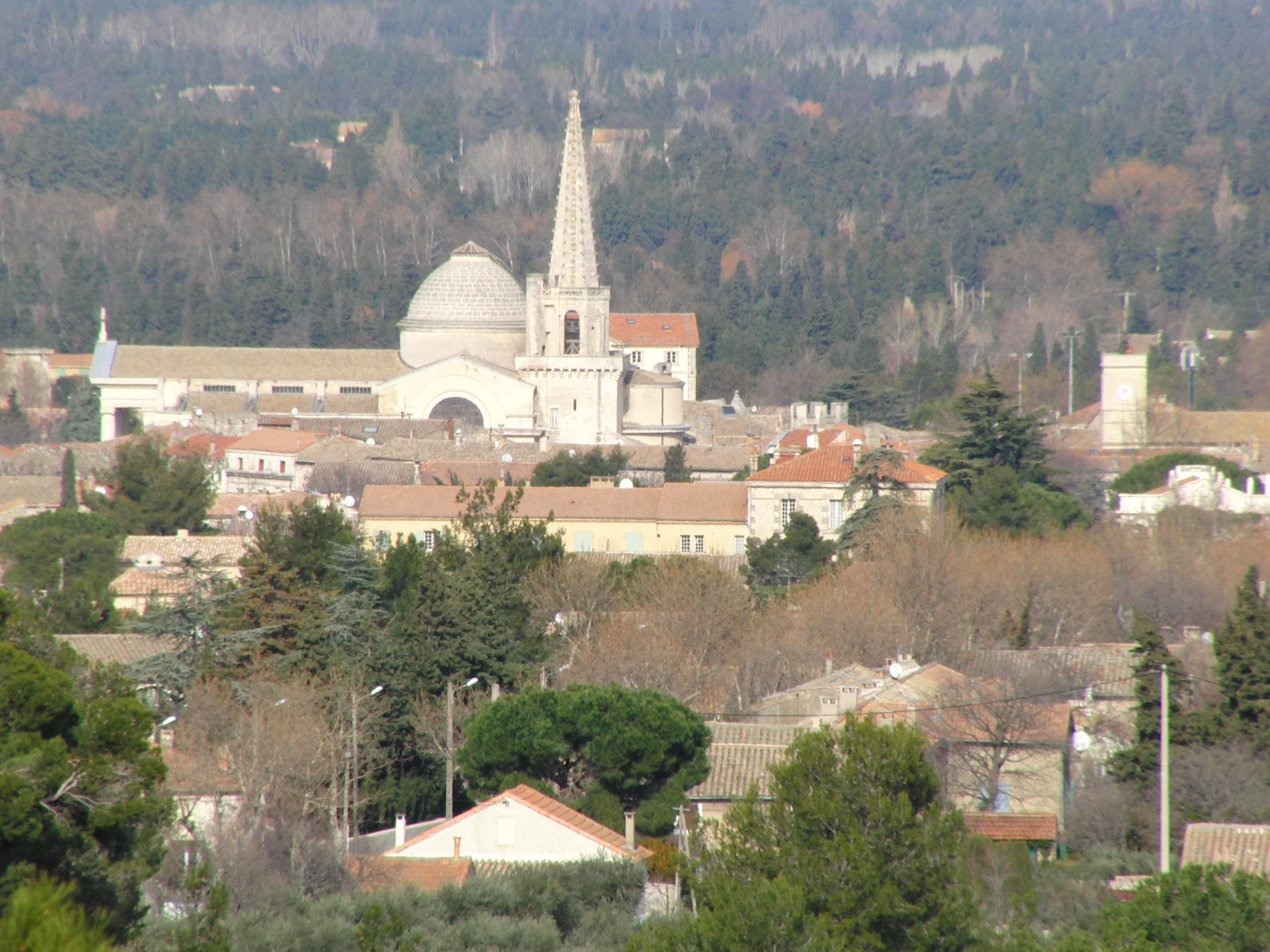 Saint-Rémy-de-Provence, vue de Glanum, Bouches-du-Rhône, France